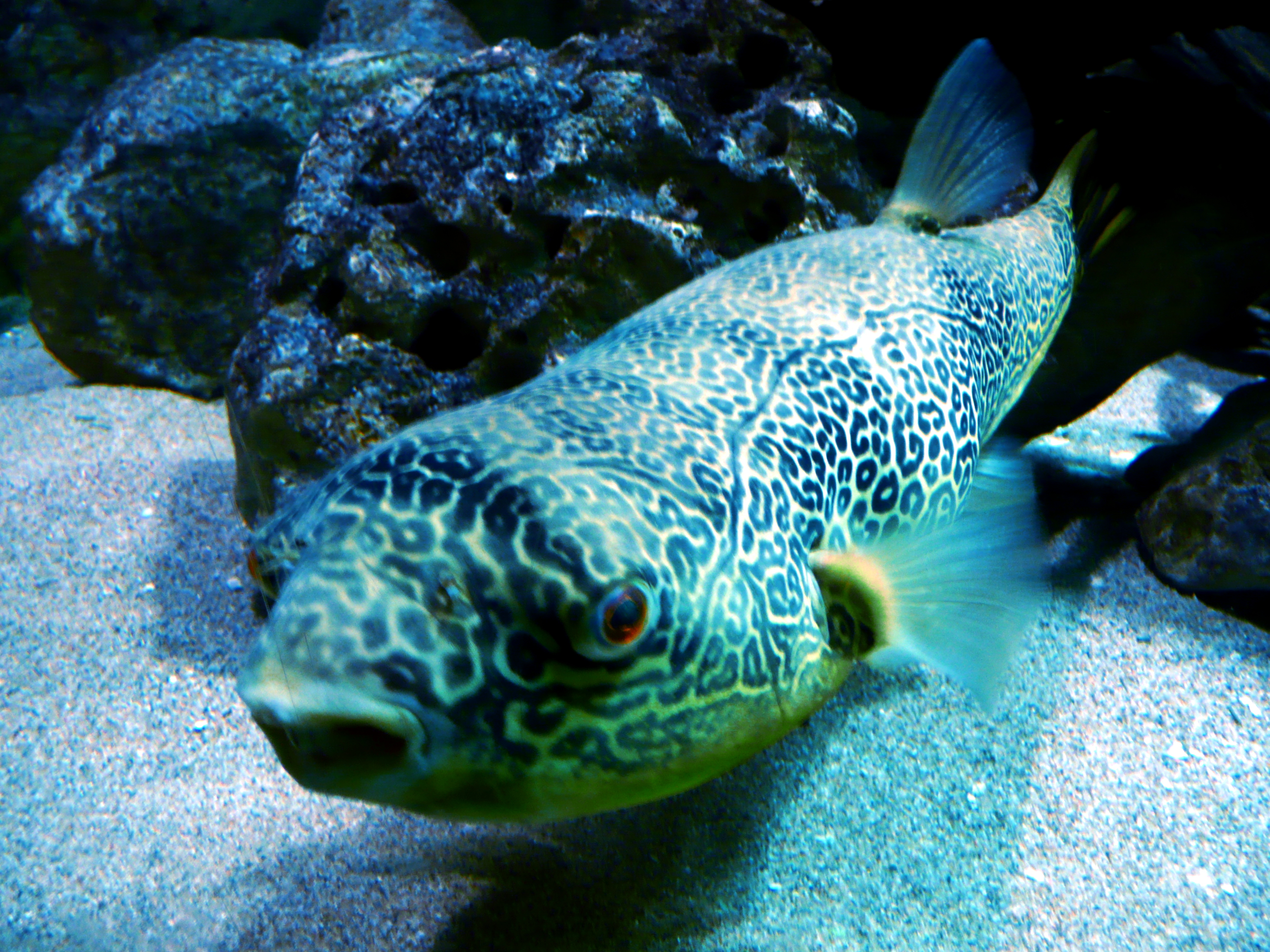 Tetraodon mbu in Aquarium tropical du Palais de la Porte Dorée